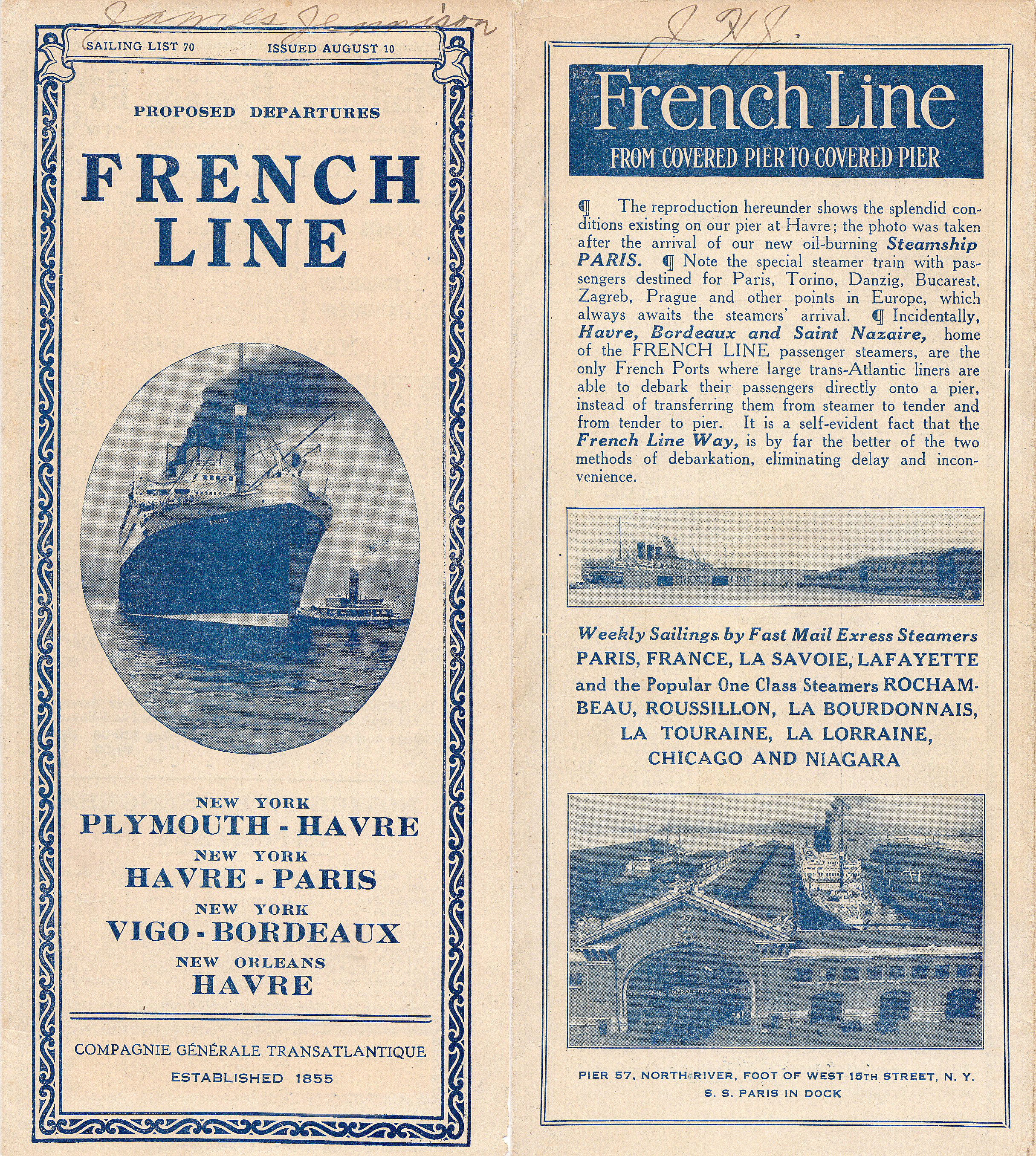 French Line Sailing List 70 August 10, 1922